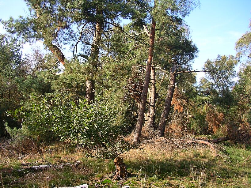 Alte Kiefern, Die Berge, Kreis Borken